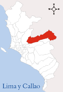 Localización del Distrito de Lurigancho Imagen elaborada por --Edgardo Reyes 21:41 9 mar, 2005 (CET) Categoría:Mapas del Perú (imagen)